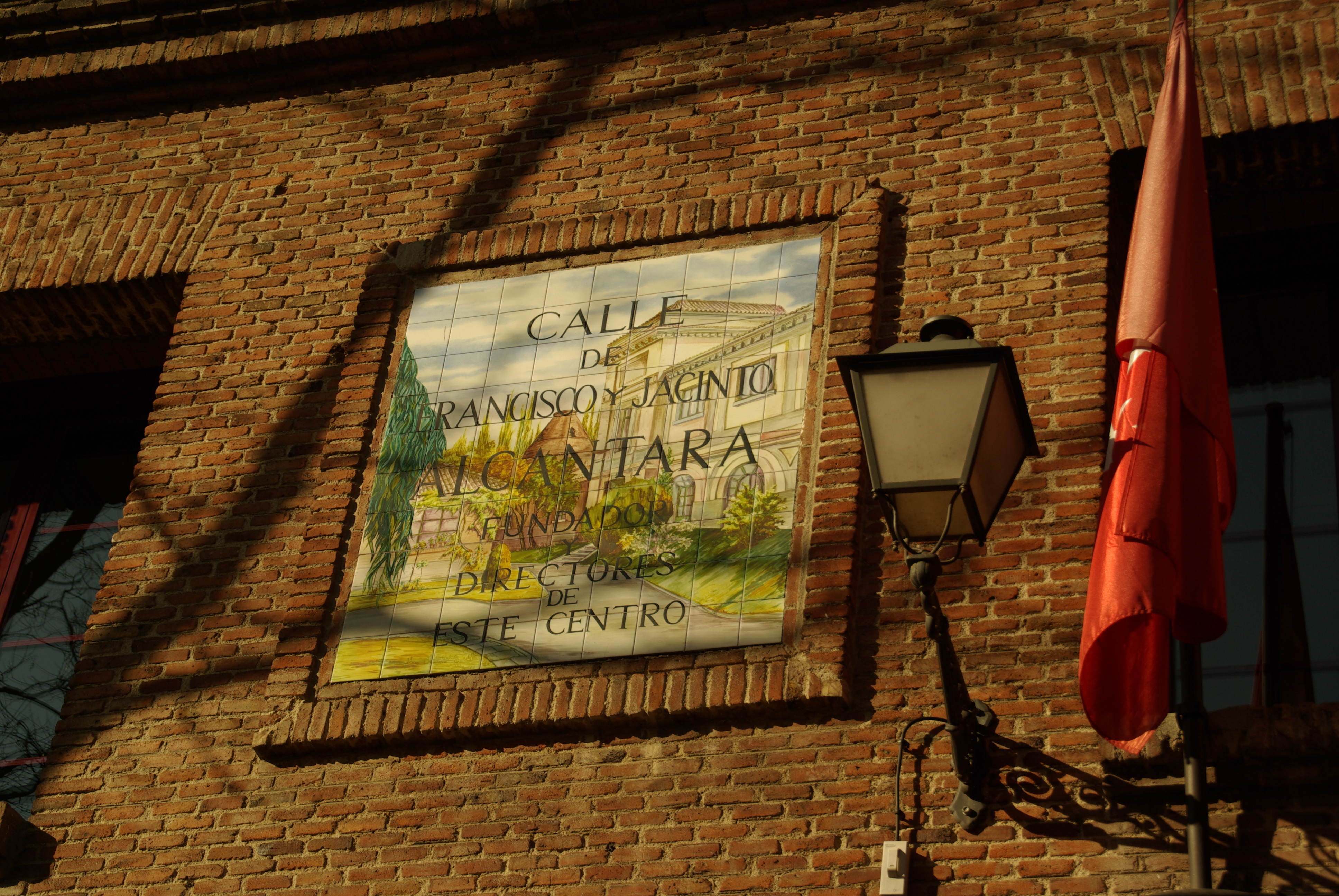 ® (S.D.) MADRID PARQUE DEL OESTE - ESCUELA DE CERAMICA